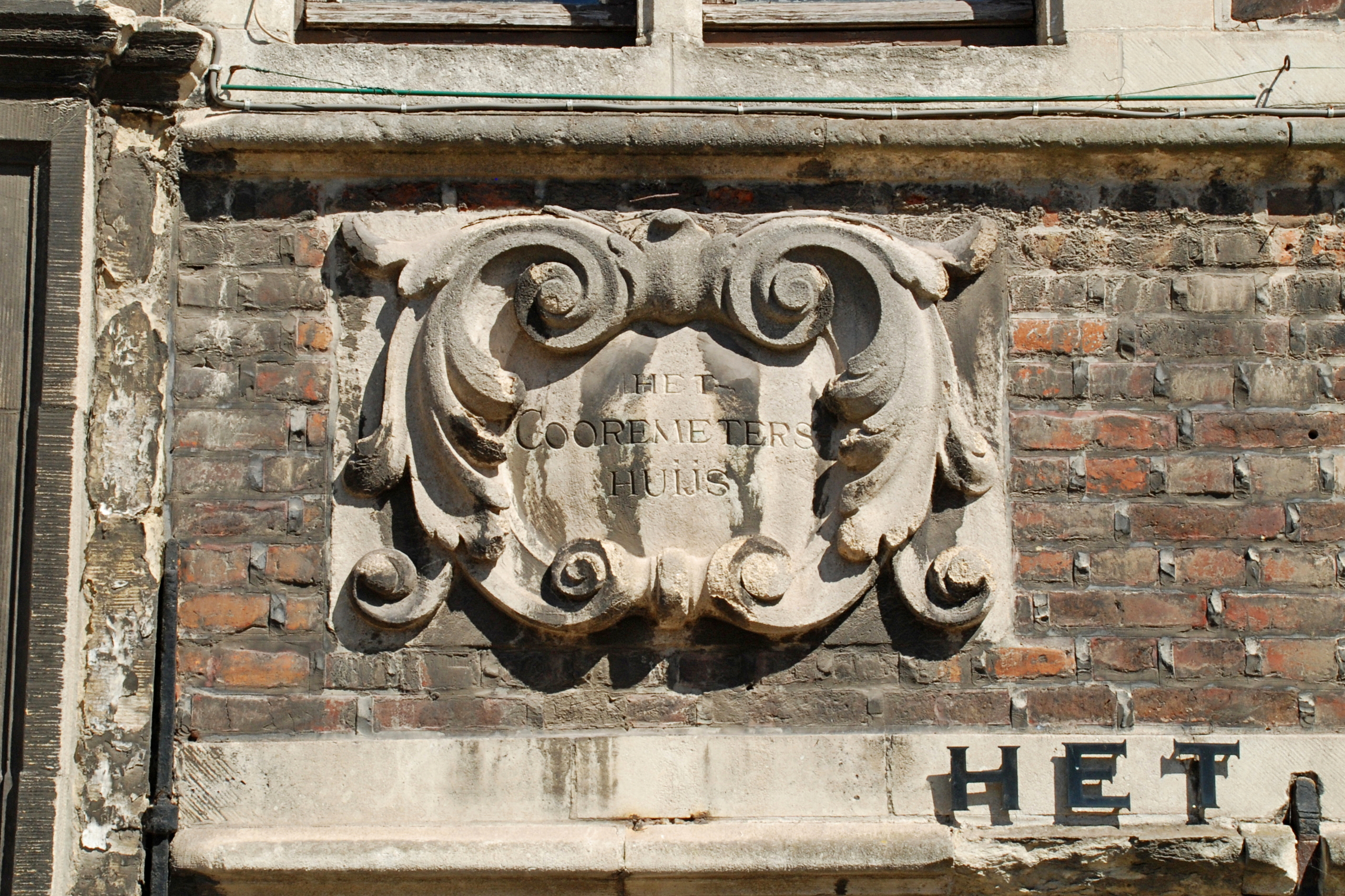 Belgique - Gand - Seconde maison des Mesureurs de grain (Cooremetershuys, 1698)